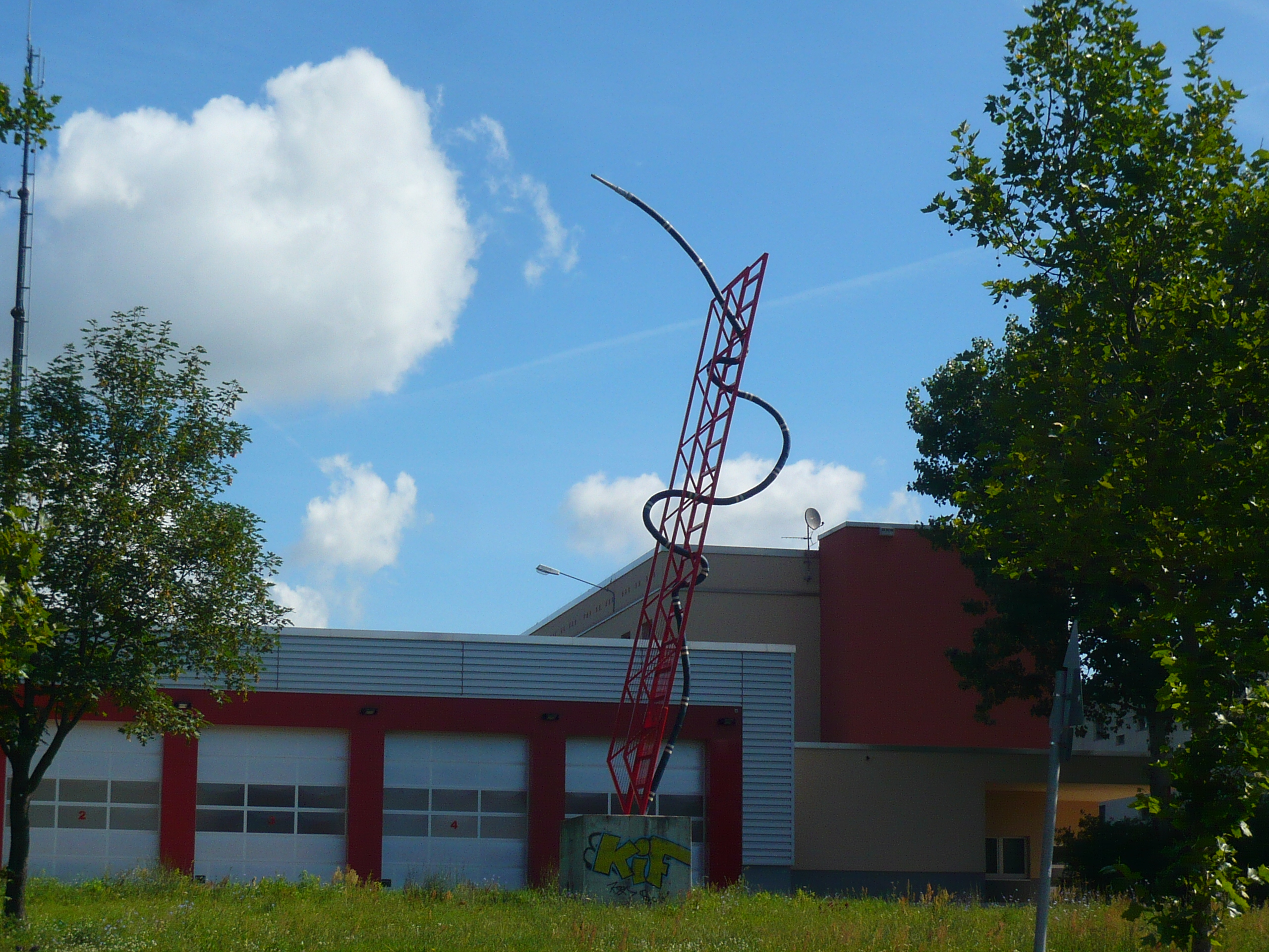 Berlin-Hellersdorf, Cecilienstr.